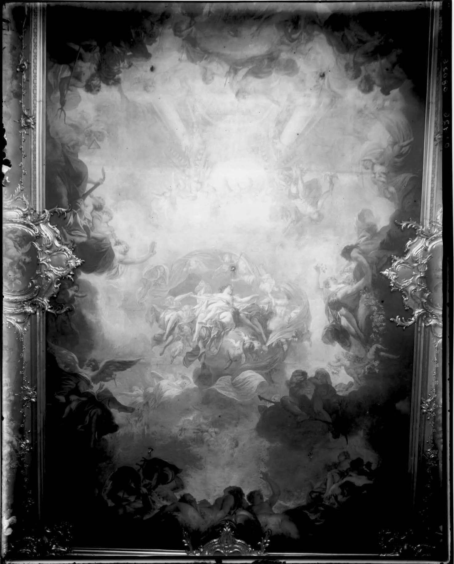 Karlsruhe Schloss - Innenbereich Marmorsaal Deckengemälde